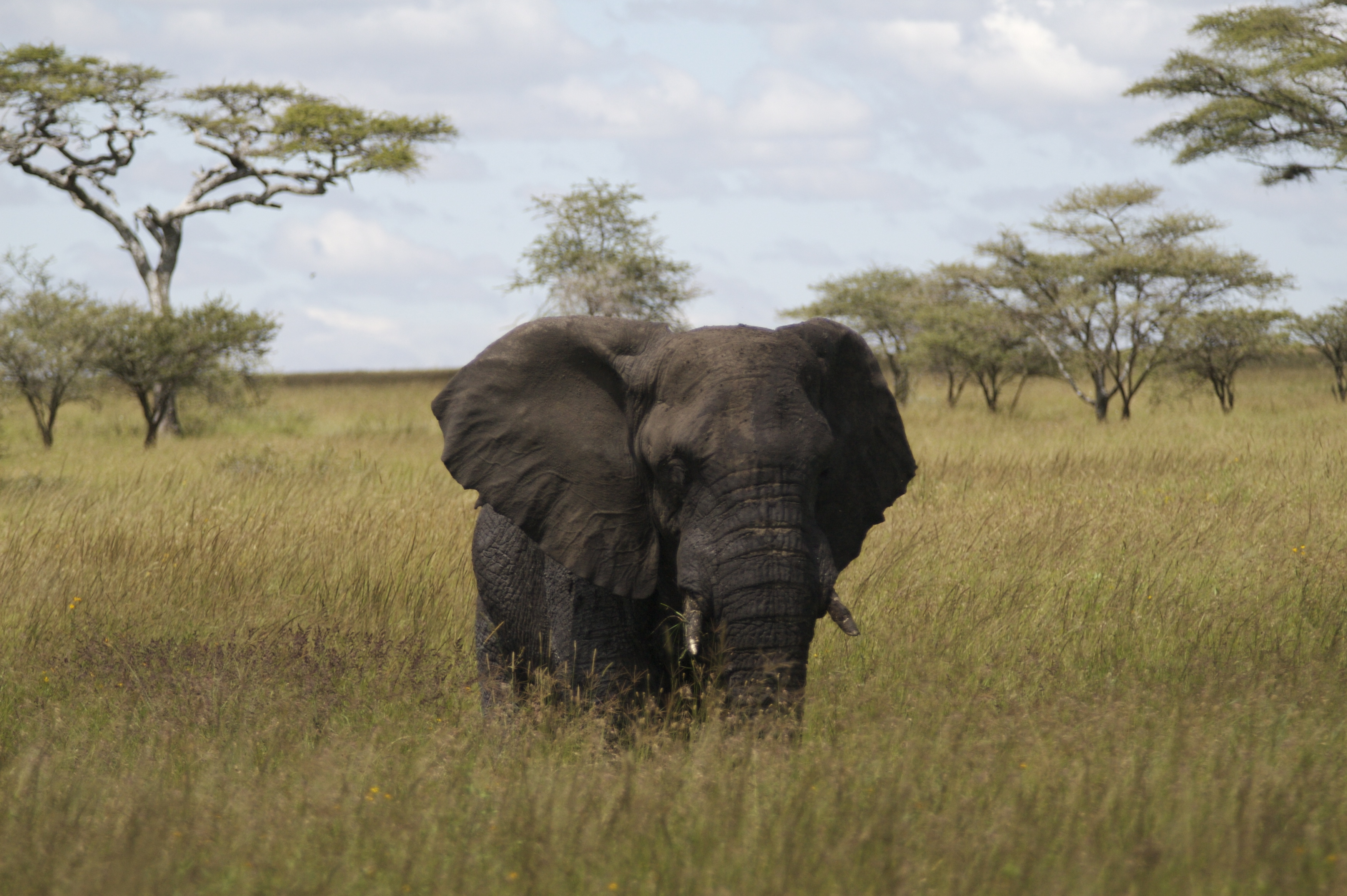 Serengeti